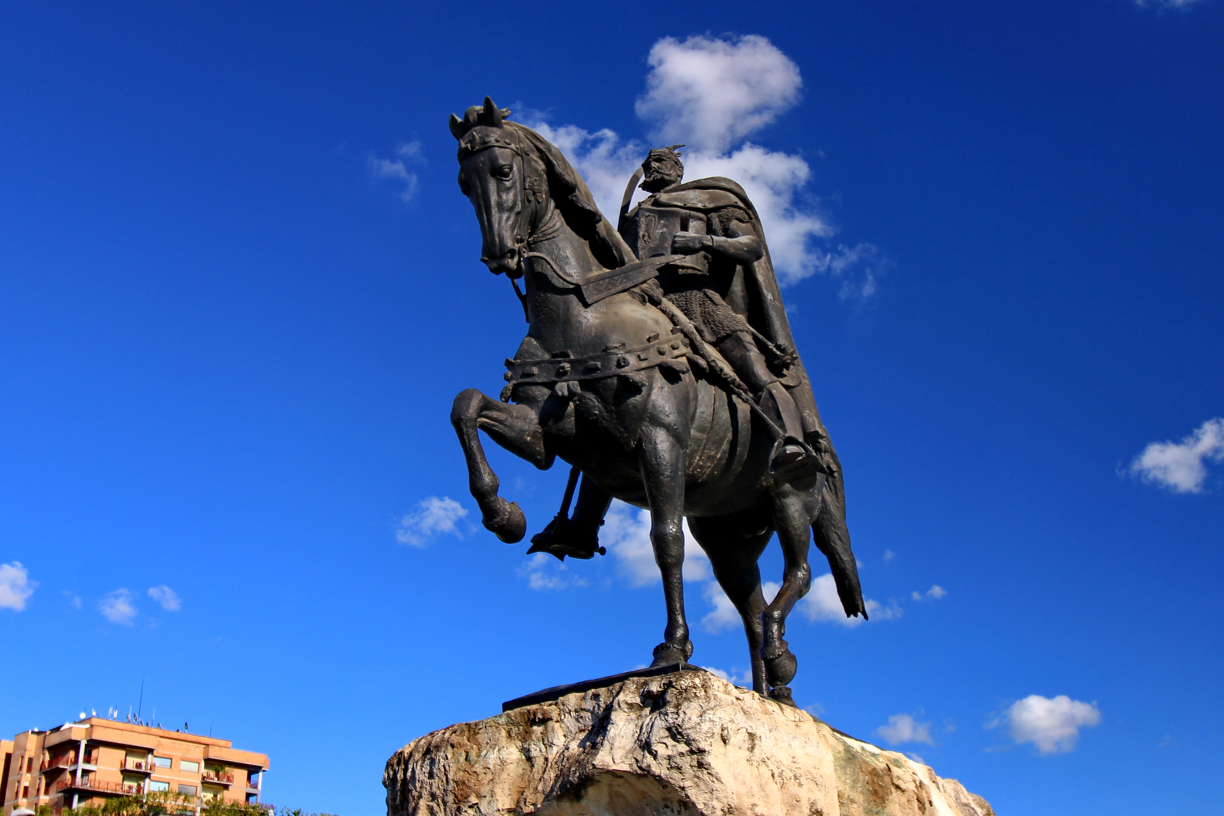 Monumenti Skenderbeut (Tiranë)